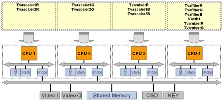 MPSoc en català